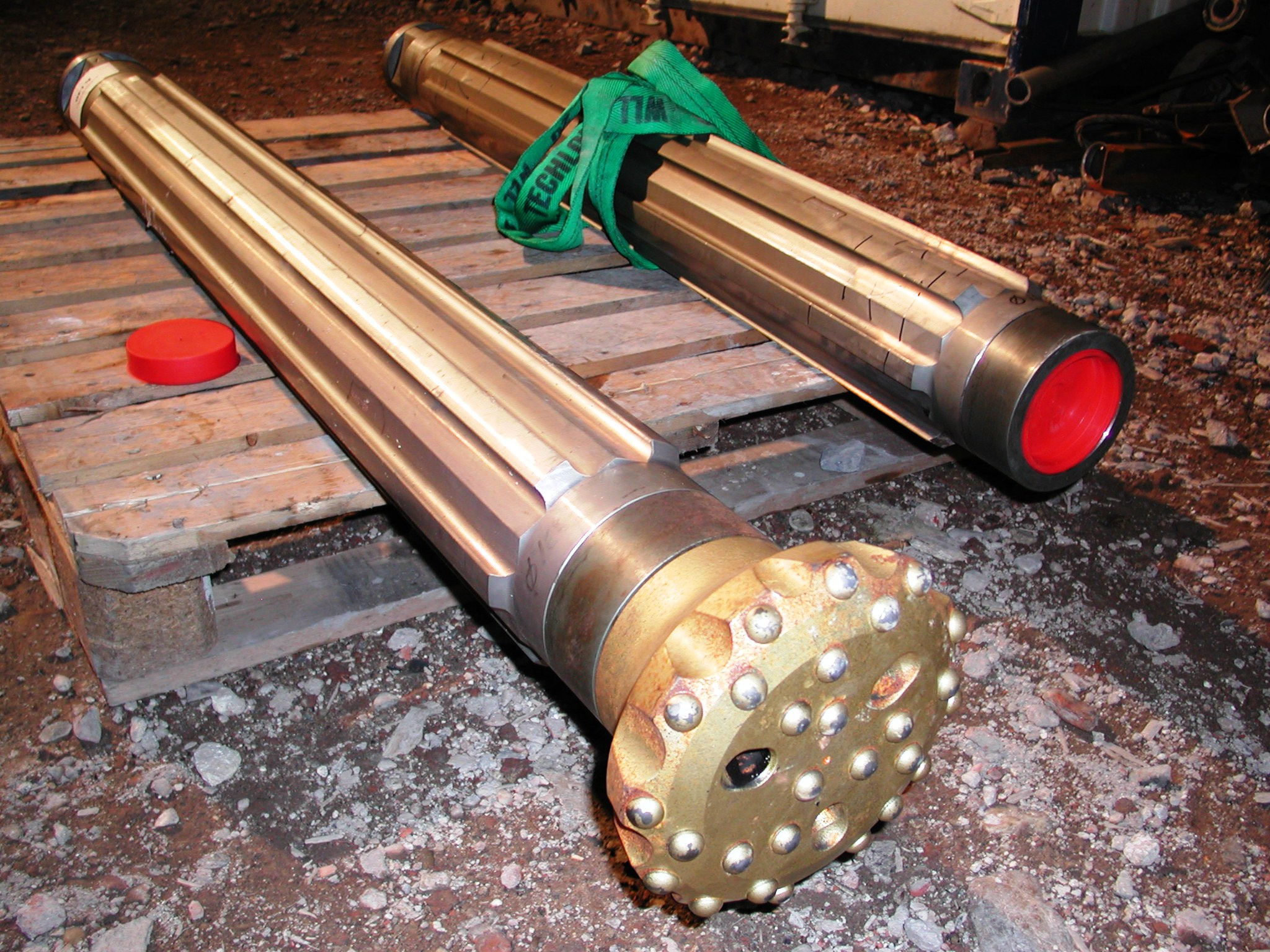 Imlochbohrhammer mit Schwerstange